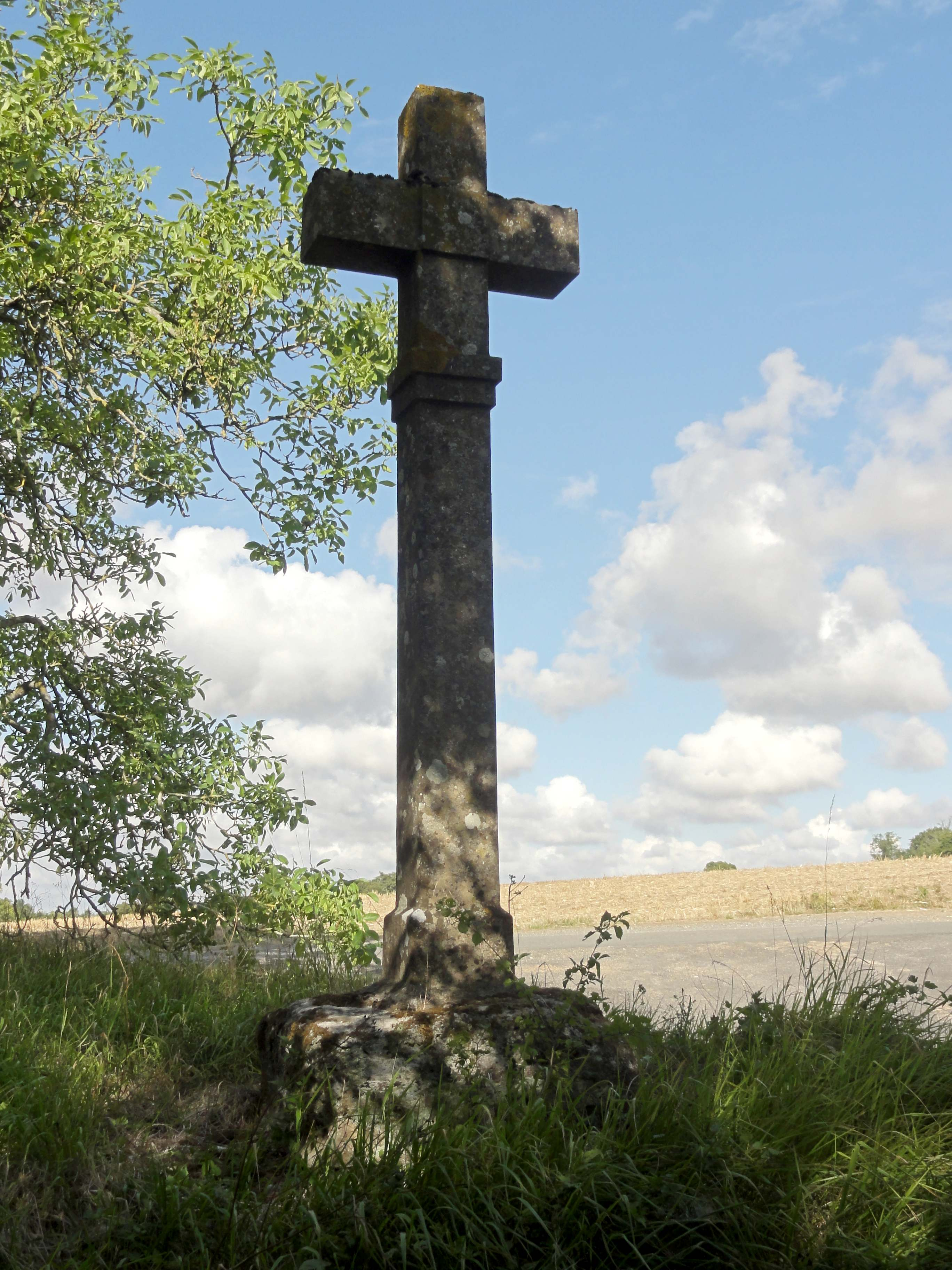 Commune d'Omerville (voir titre).